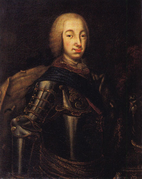 Портрет парный к изображению великой княгини Екатерины Алексеевны (1753, ГРМ). В качестве основы для своего произведения А.П. Антропов использовал портрет работы Г.-К. Грота. Петр Федорович, будущий российский император Петр III, изображен в латах и горностаевой мантии с орденами св. Андрея Первозванного и св. Анны.